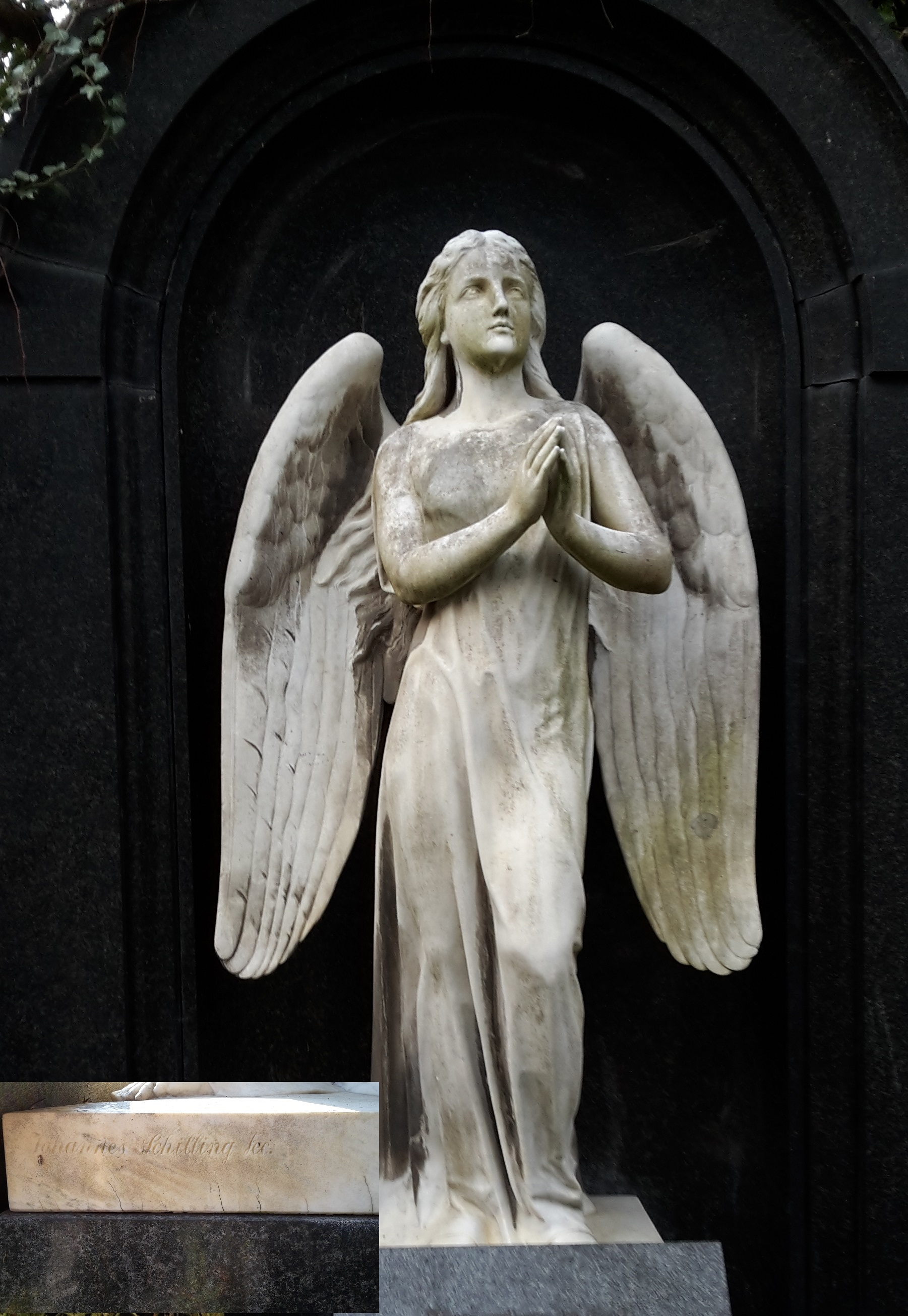 Grabmal Naumann mit Marmor-Engel auf dem Taucherfriedhof in Bautzen (eine große anmutige Engelsfigur aus weißem Marmor in einer Rundbogen-Nische aus poliertem Syenit)